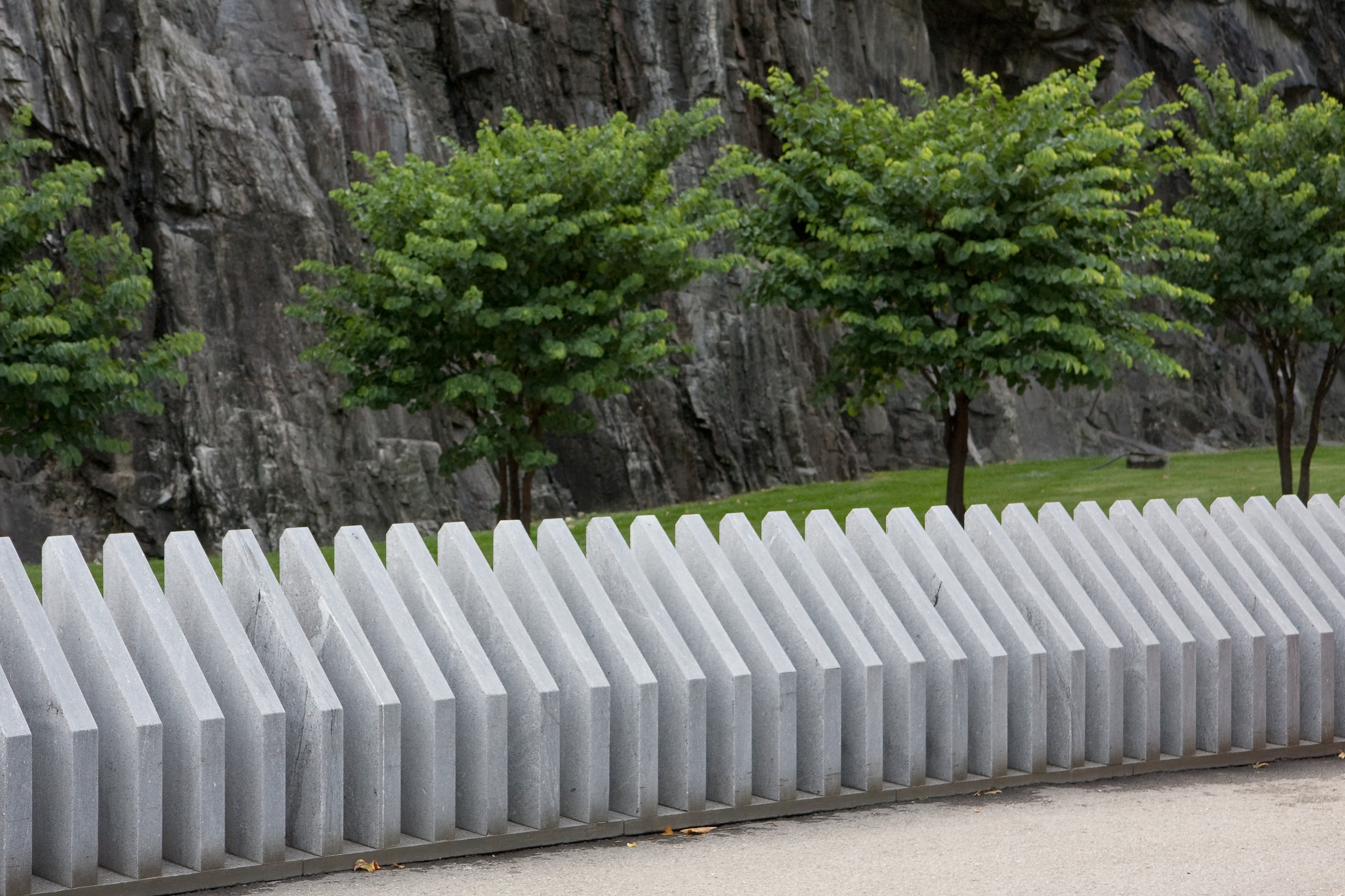 Livio Vacchinis Piazza del Sole in Bellinzona - Detail